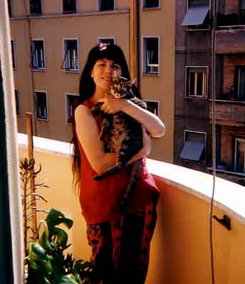 la scrittrice italiana [1]alda teodorani con il suo gatto Pumino